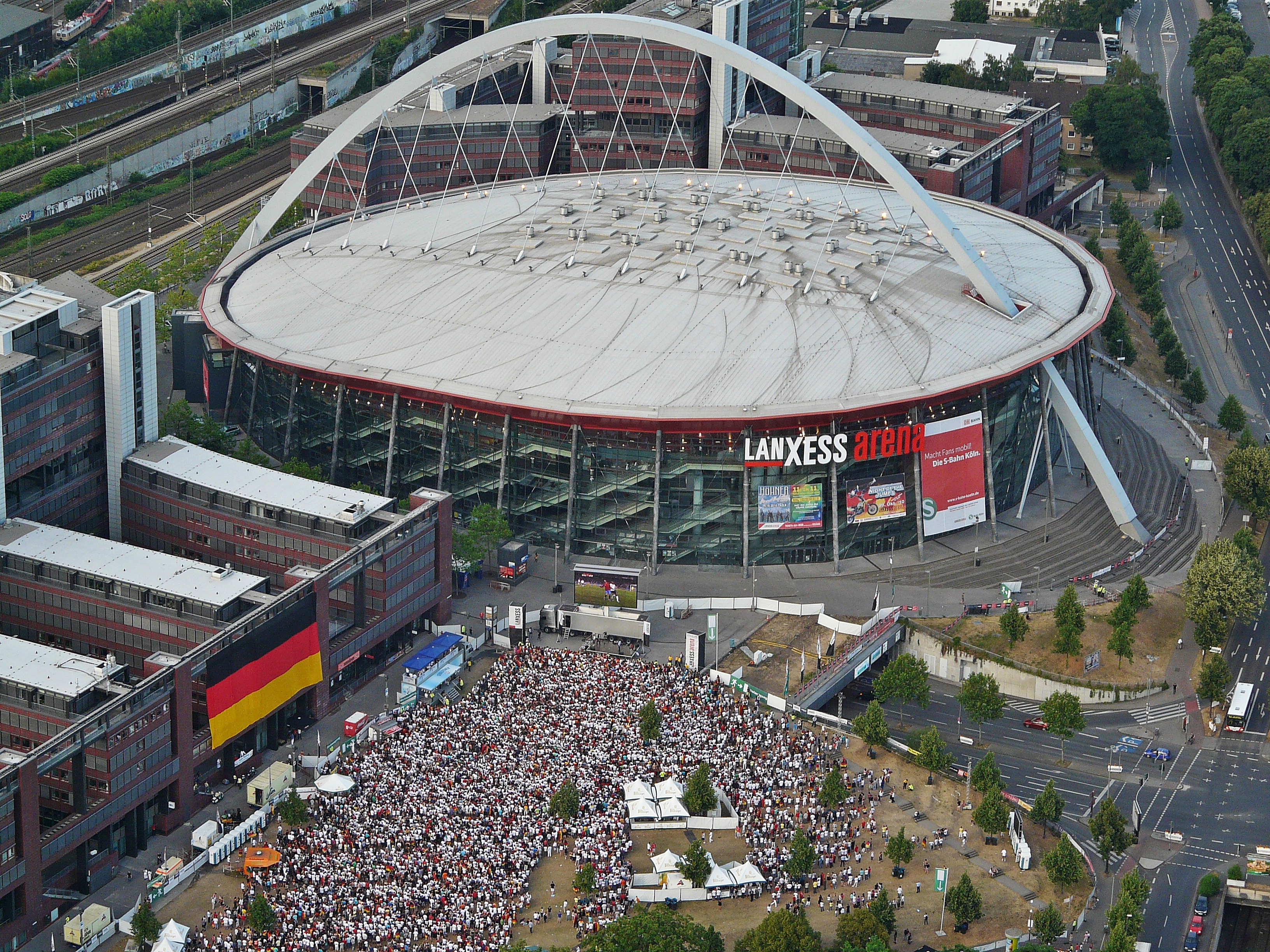 Lanxess Arena bei der Fussball-WM 2010, Public Viewing